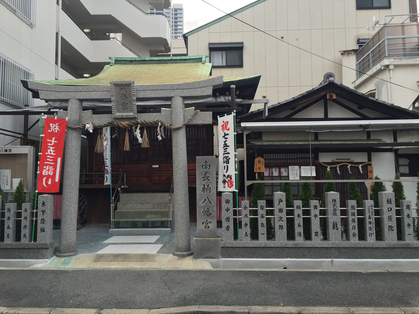 南長柄八幡宮の鳥居と社殿